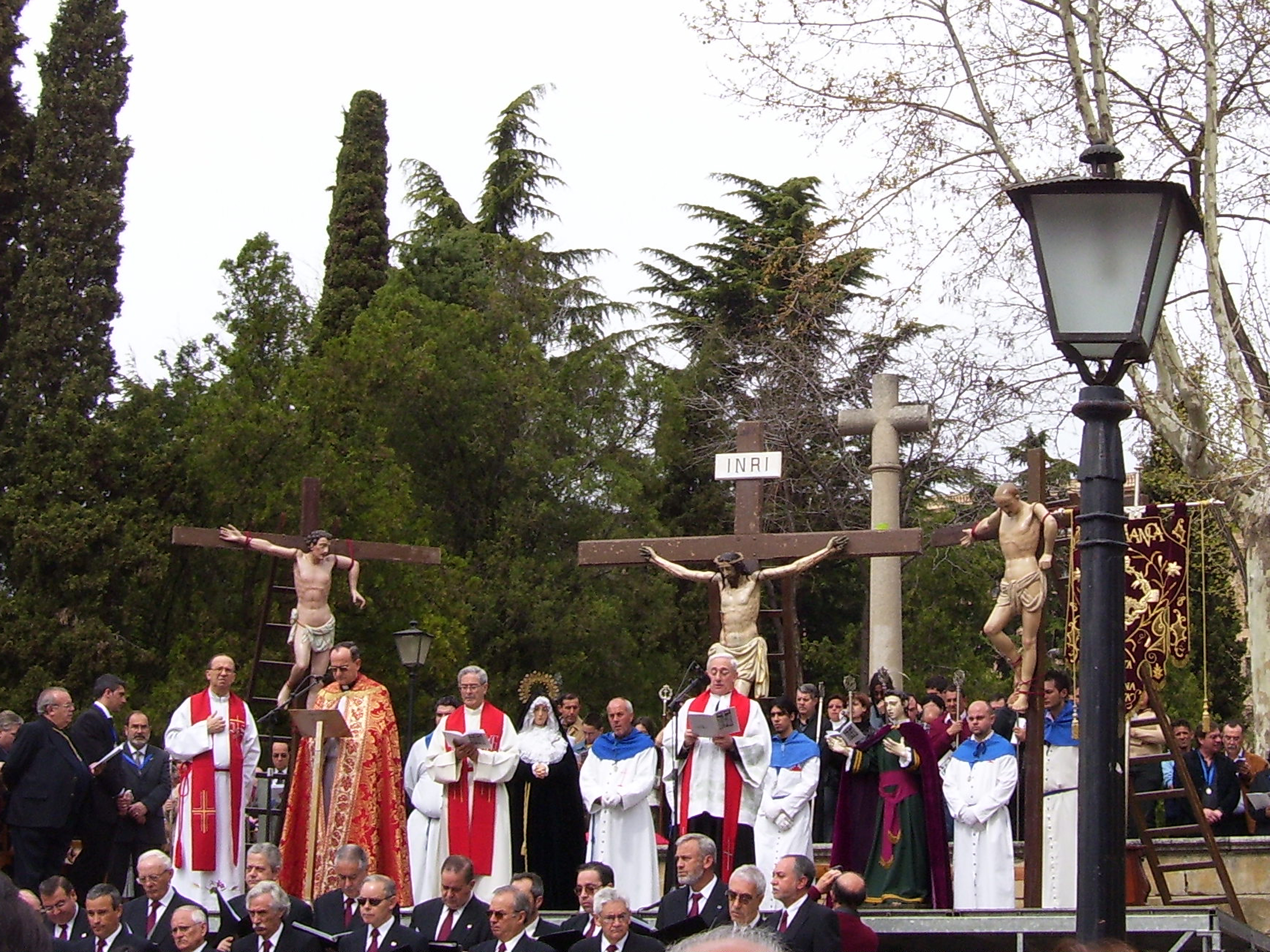 Celebración del Acto del Descendimiento en Salamanca la mañana del Viernes Santo, consistente en el desenclavo del cuerpo de Cristo de la Cruz y exposición en besapies.